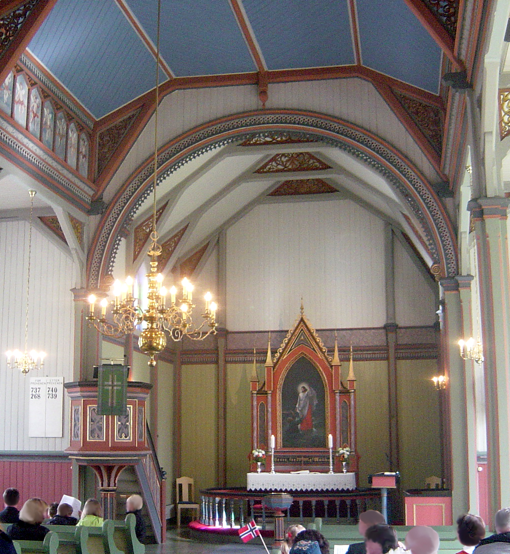 Gjemnes kirke